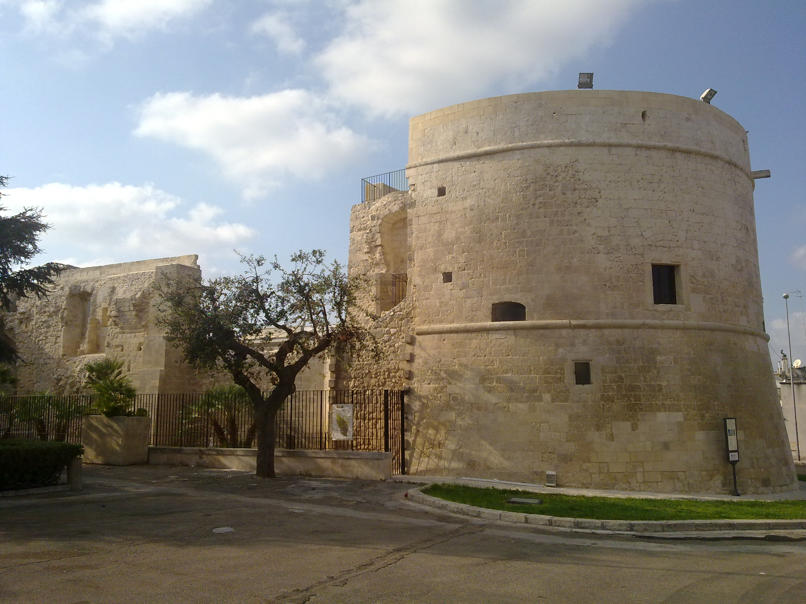 Castello Aragonese di Palmariggi, Lecce